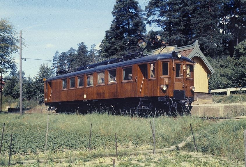 Långångsbanan vid Långångstorp